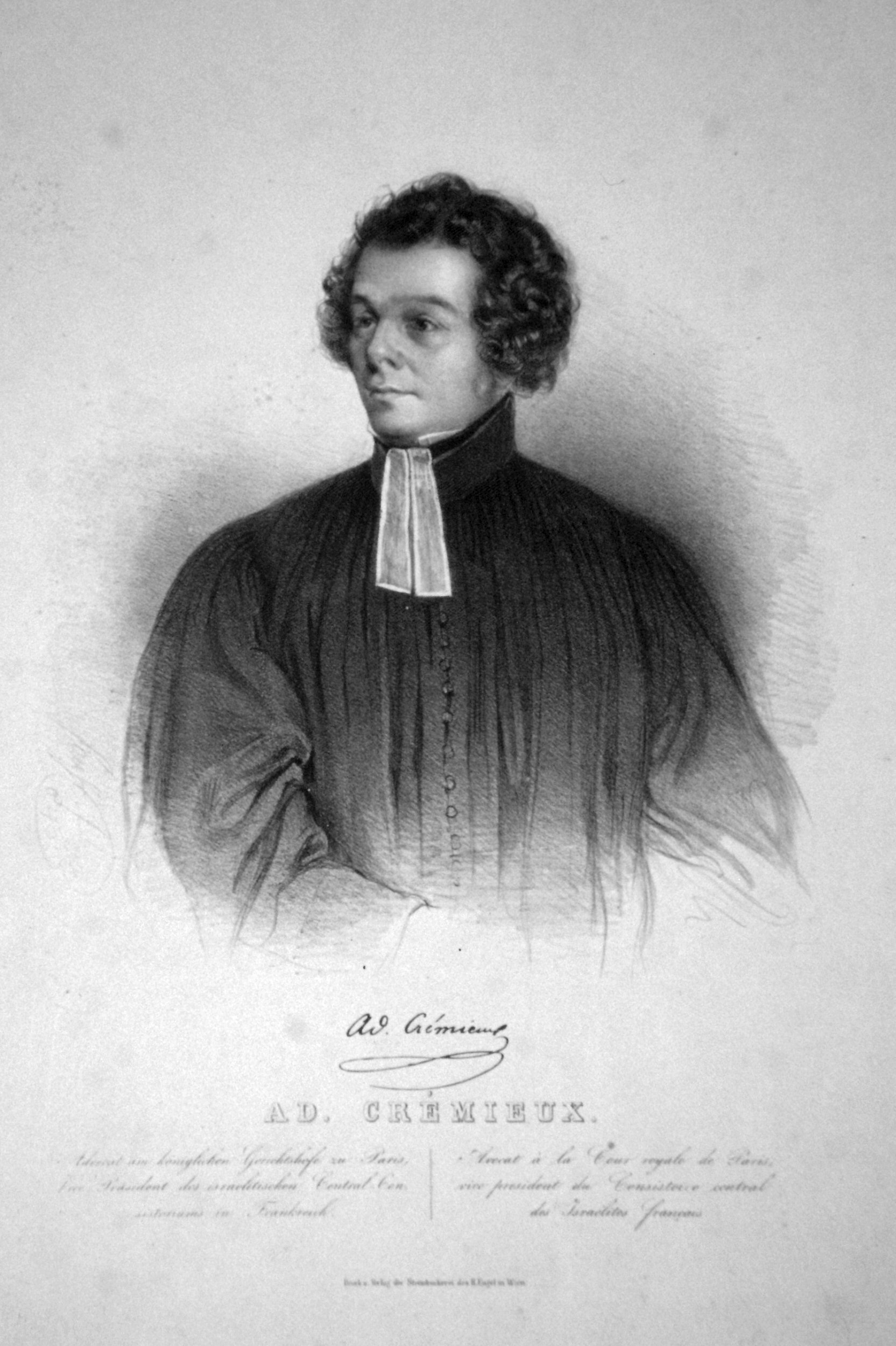 Adolf Cremieux, Lithographie von Faustin Herr, 1840